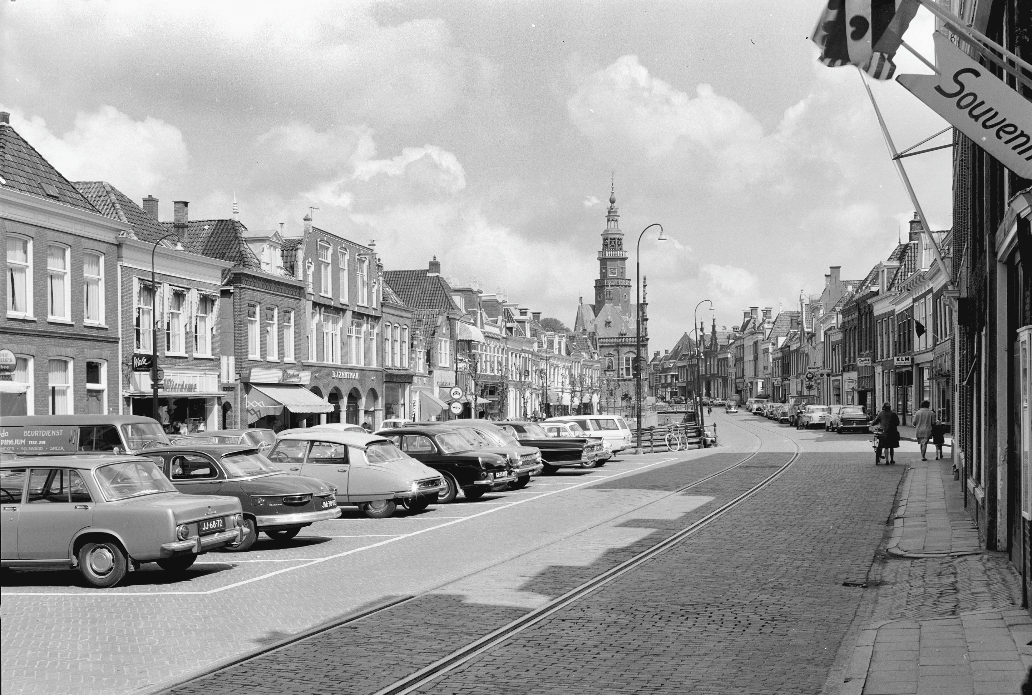 overzicht